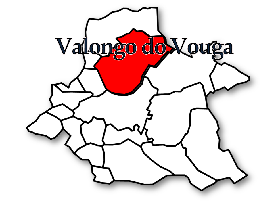 Censos 1864/2011